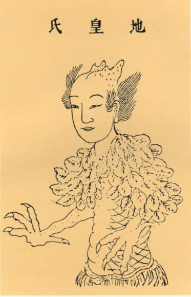 神话传说中的远古三皇之一。